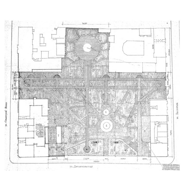 План Міського Саду станом на 1990р.